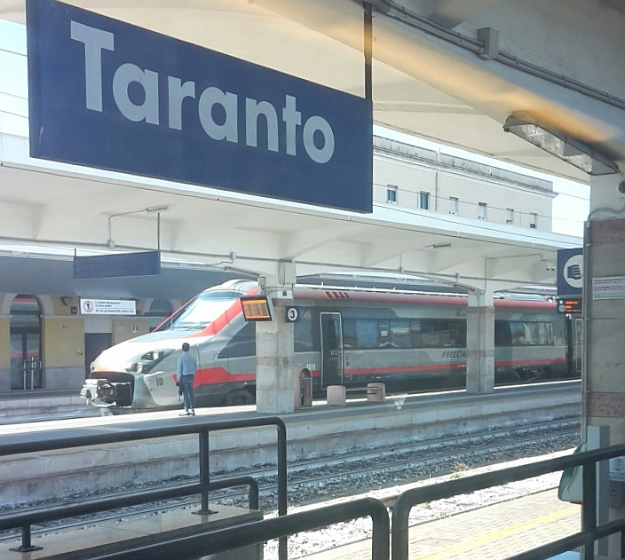 Etr700 in livrea Frecciargento alla stazione di Taranto.